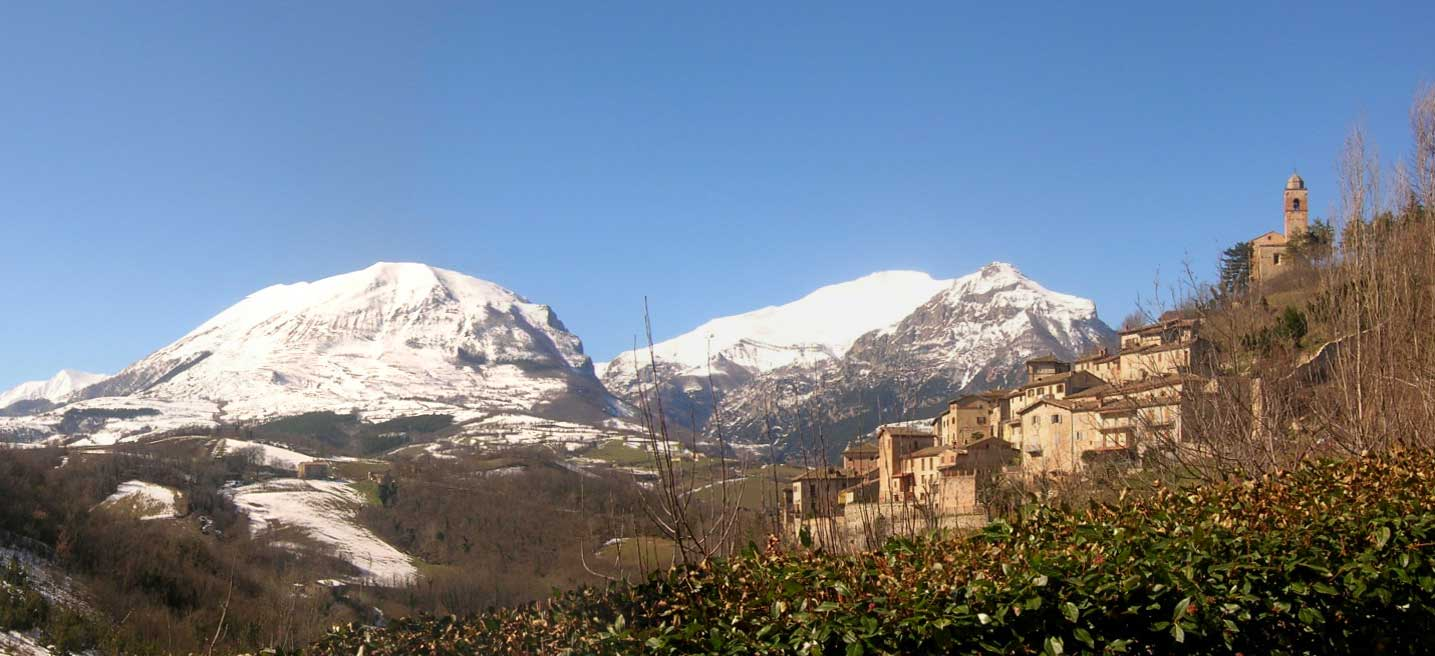 Montefortino, sullo sfondo del Monte Sibilla e del Monte Priora